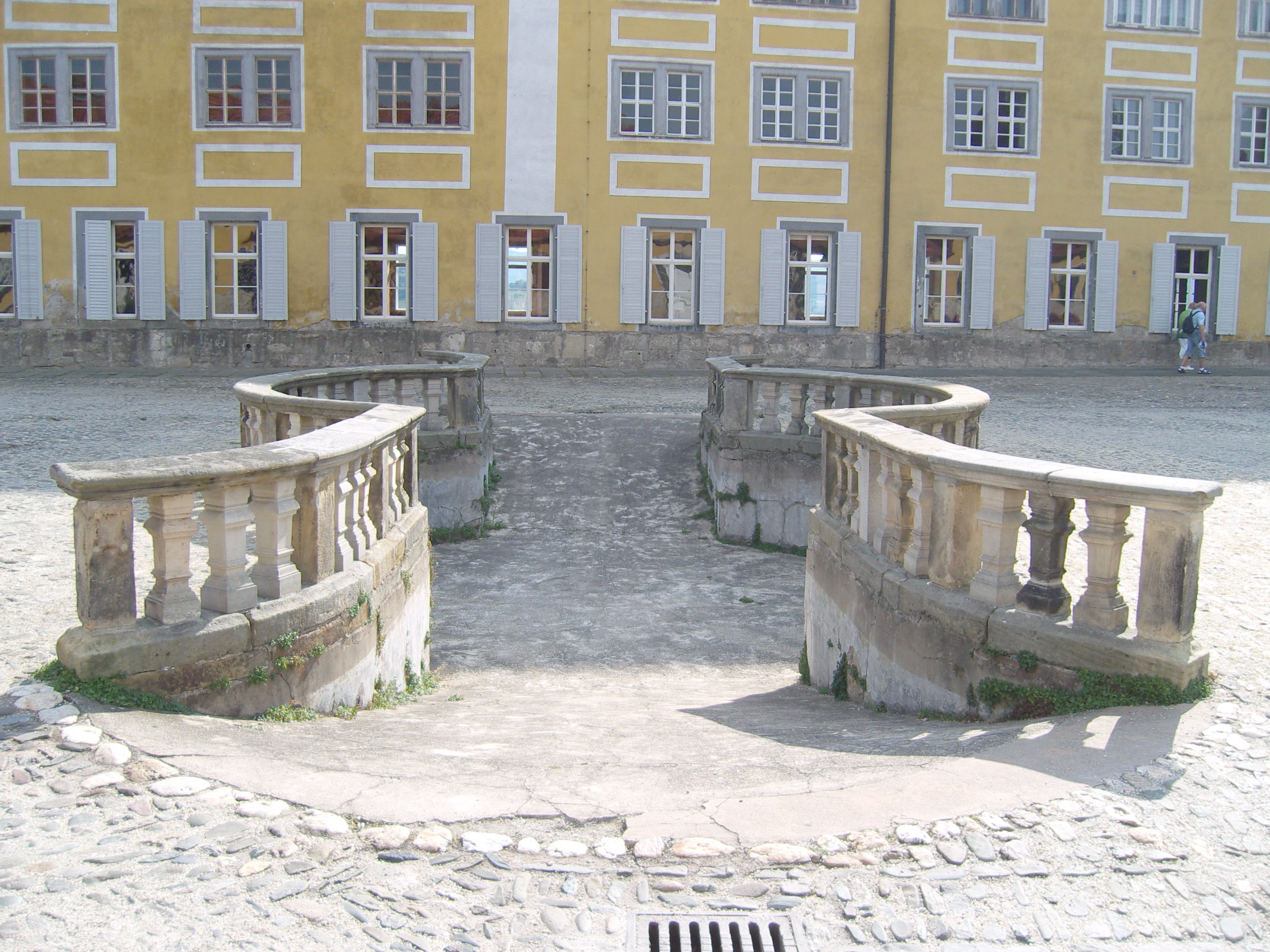 Pferdeschwemme im Innenhof Schloss Heidecksburg Rudolstadt